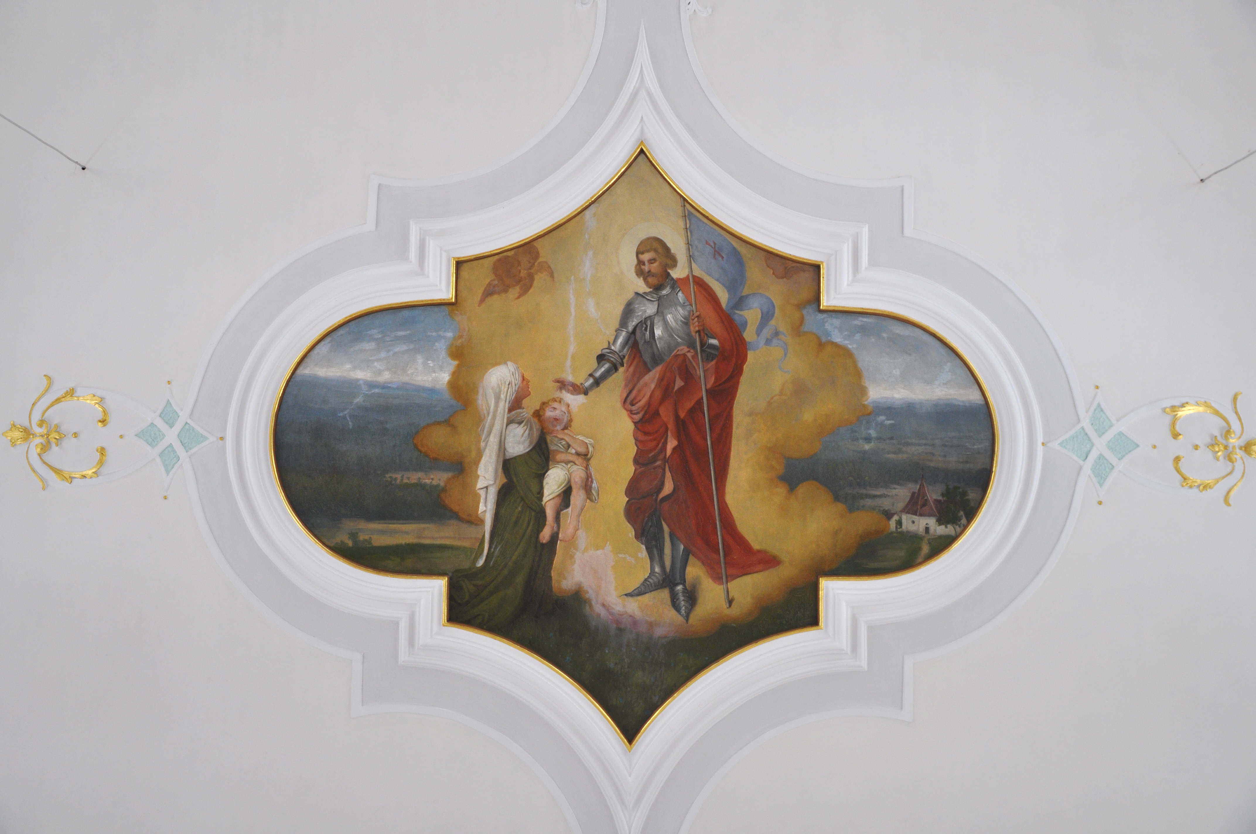 Wolpertswende, Pfarrkirche St. Gangolf, Deckengemälde: Hl. Gangolf (mit Abbildung der Gangolfkapelle), von Ferdinand Kaltenbacher, 1890/1891